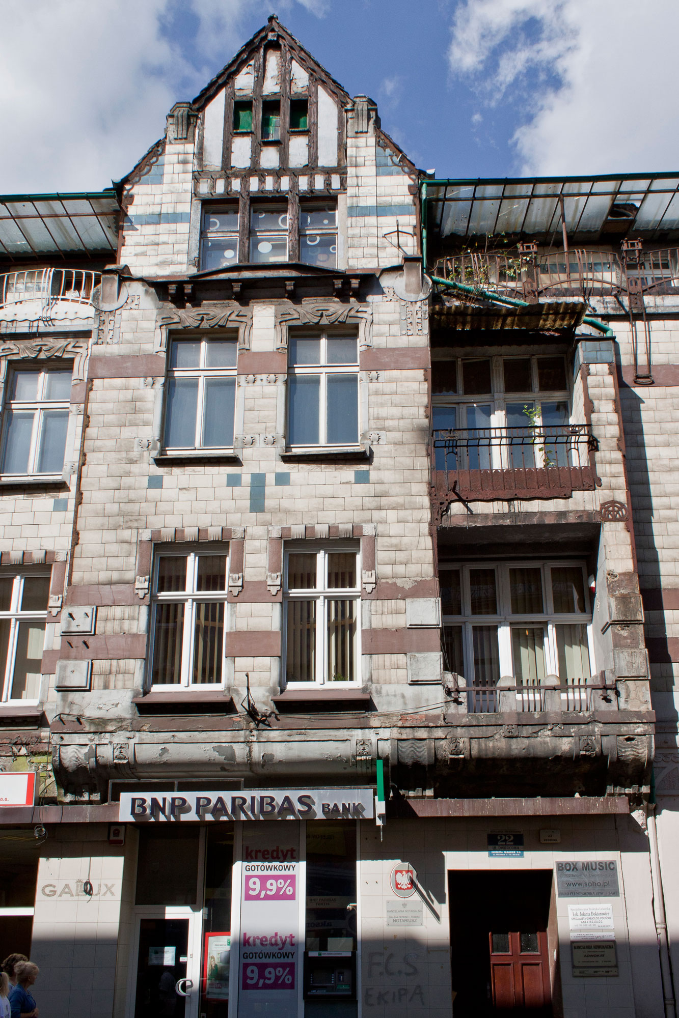 Kamienica z 1905 r. ul. Dworcowa 22. Bytom